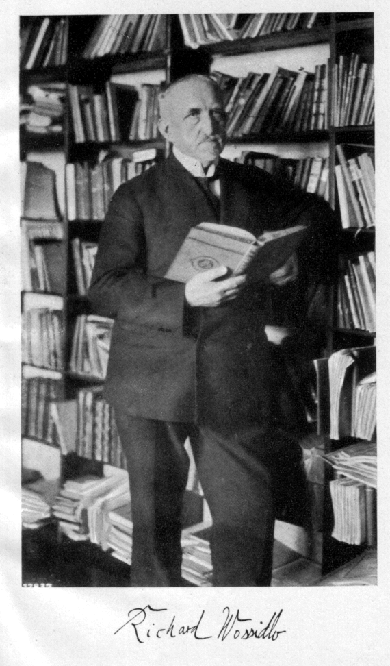 Richard Wossidlo (1859-1939), deutscher Gymnasiallehrer und Ethnologe.